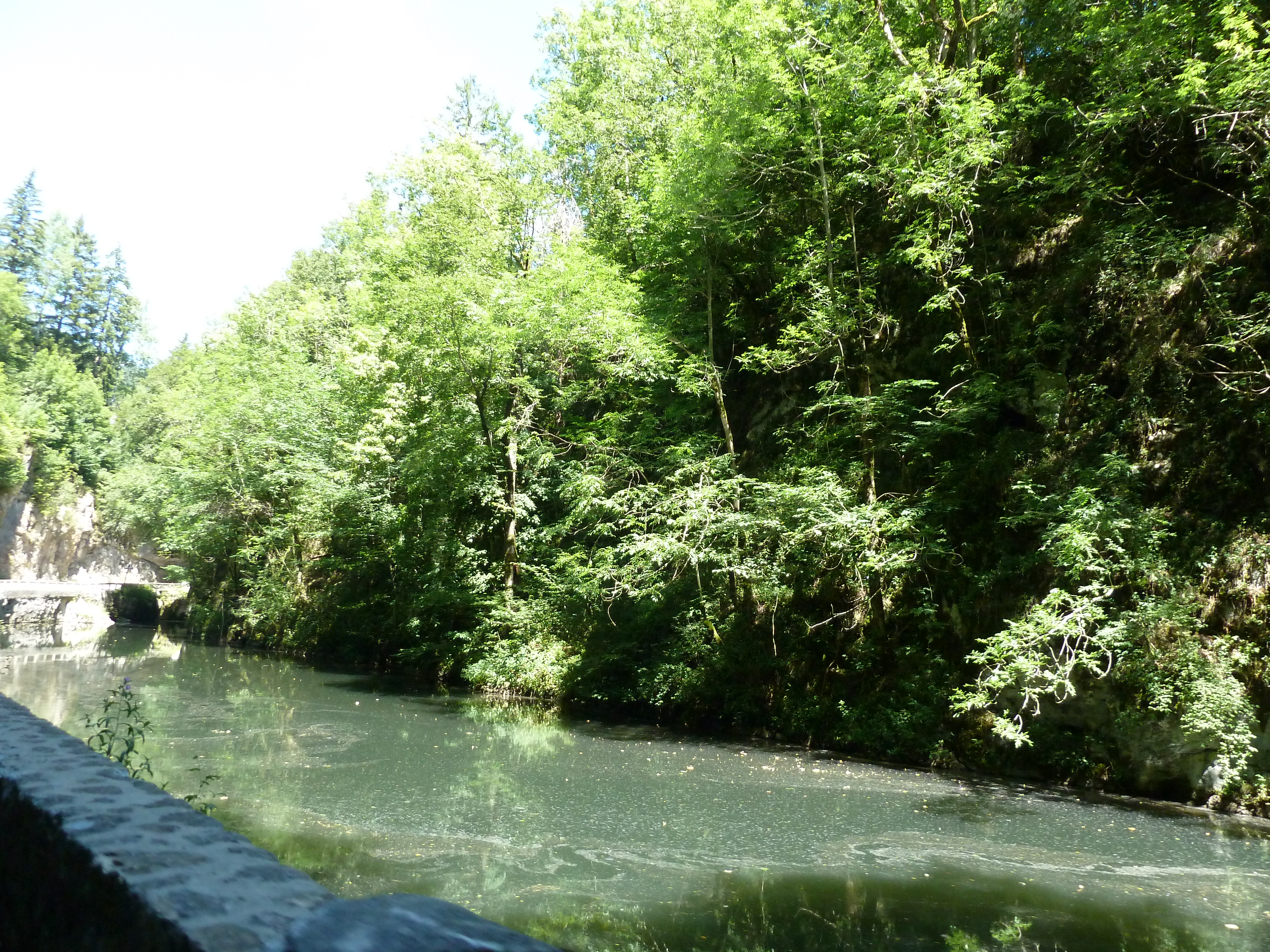 Les gorges de la Bourne, à Villard-de-Lans (38).